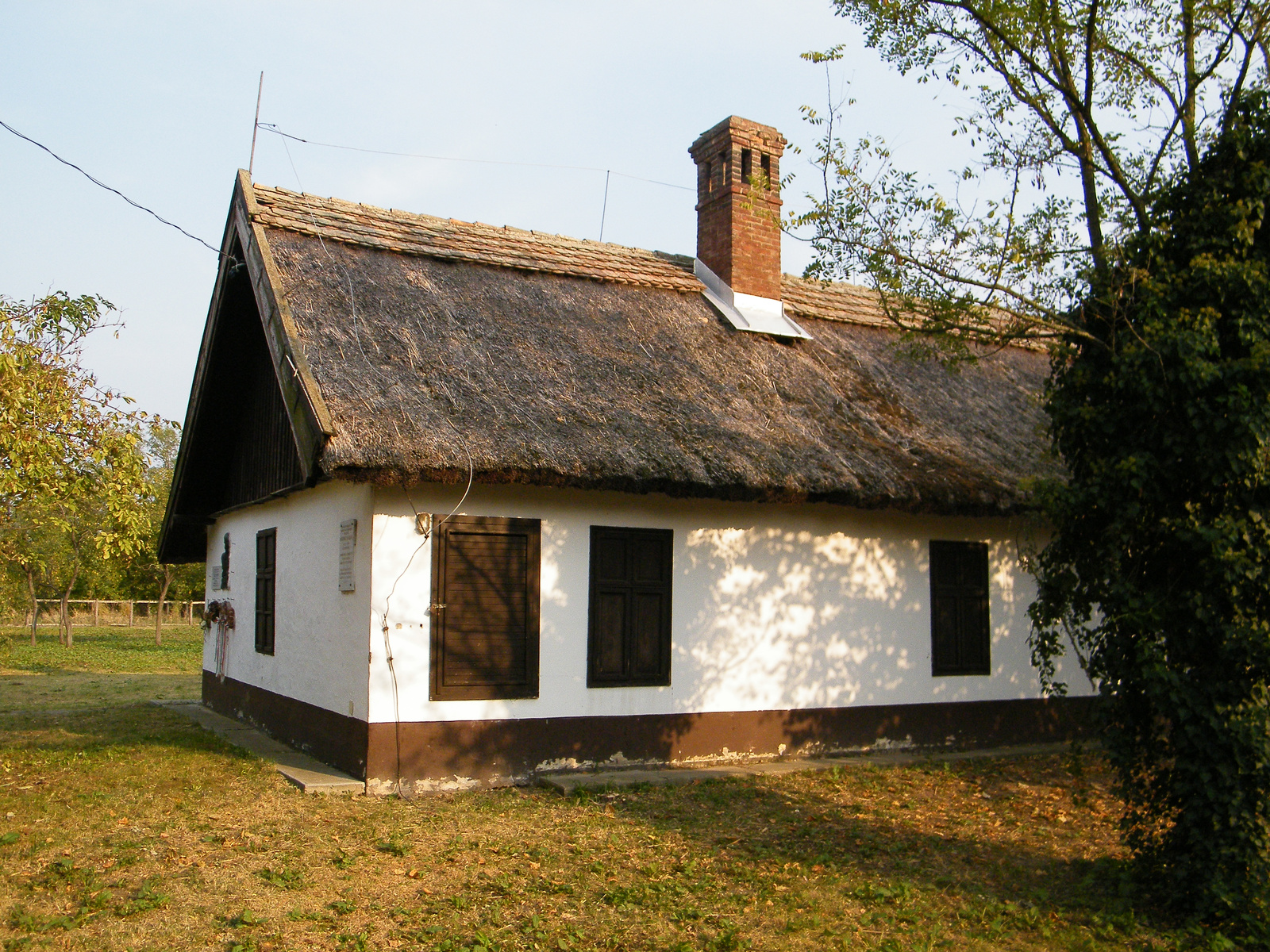 Lakóház, népi (Biharnagybajom, Petőfi utca 4.) This is a photo of a monument in Hungary, Identifier: 5205